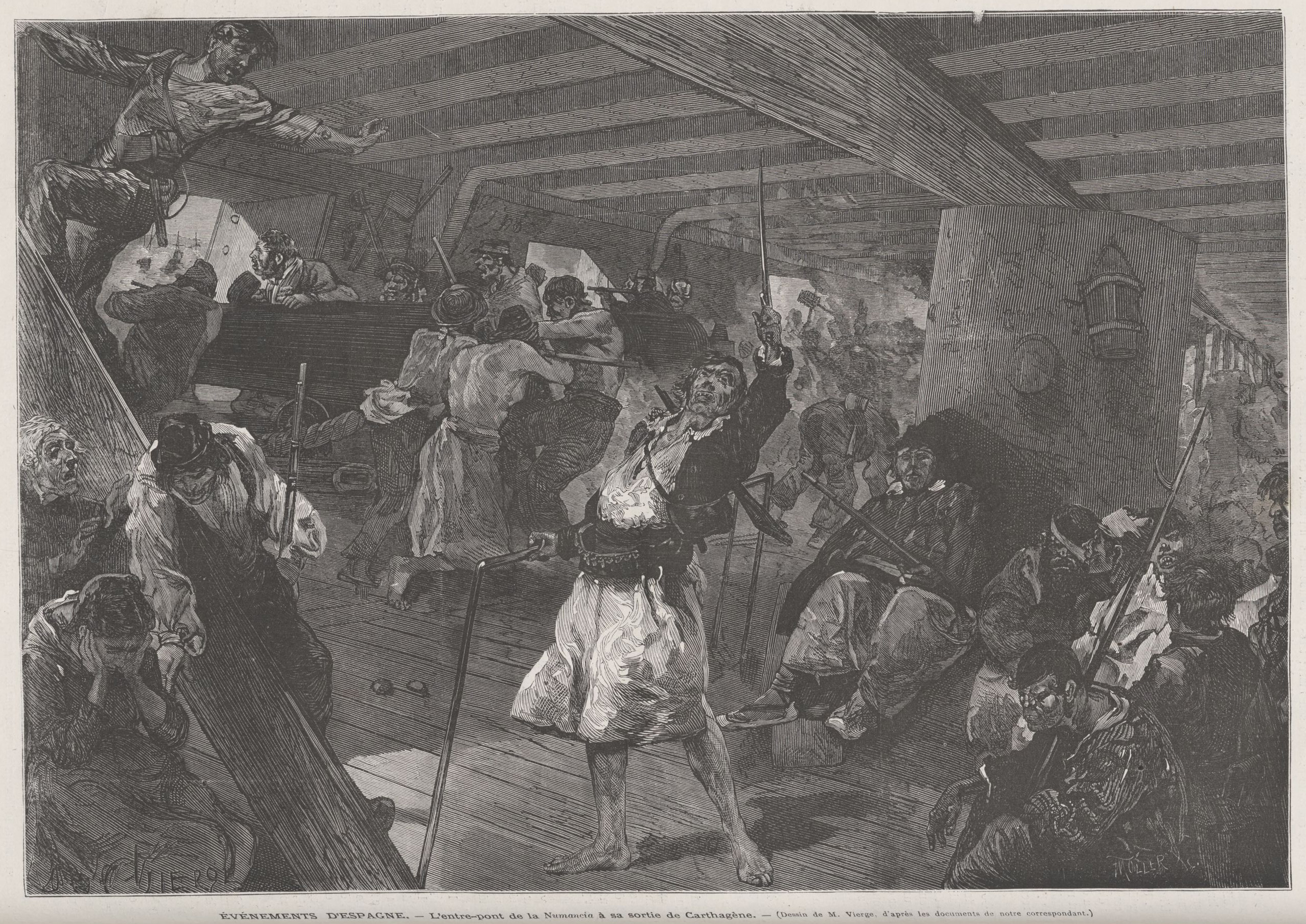 Événements d'Espagne. — L'entre-pont de la Numancia à sa sortie de Carthagène. — (Dessin de M. Vierge, d'après les documents de notre correspondant)